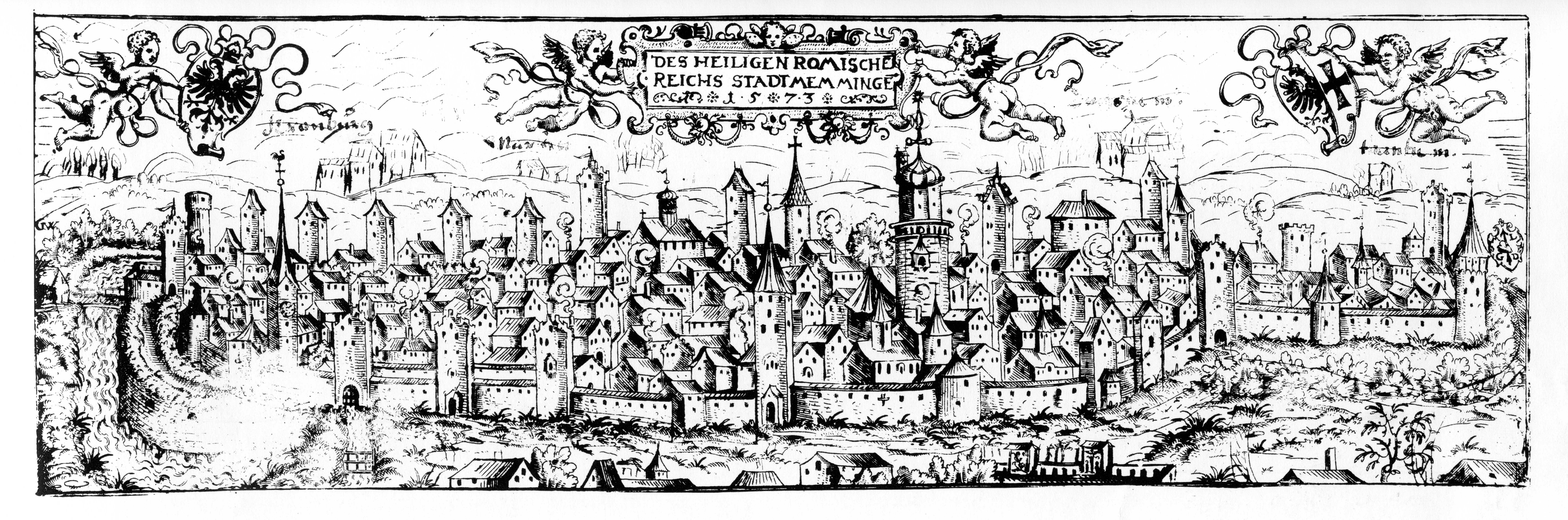 Memmingen von Osten 1573, Radierung von Georg Wechter, Nürnberg, 9,2 x 29 cm